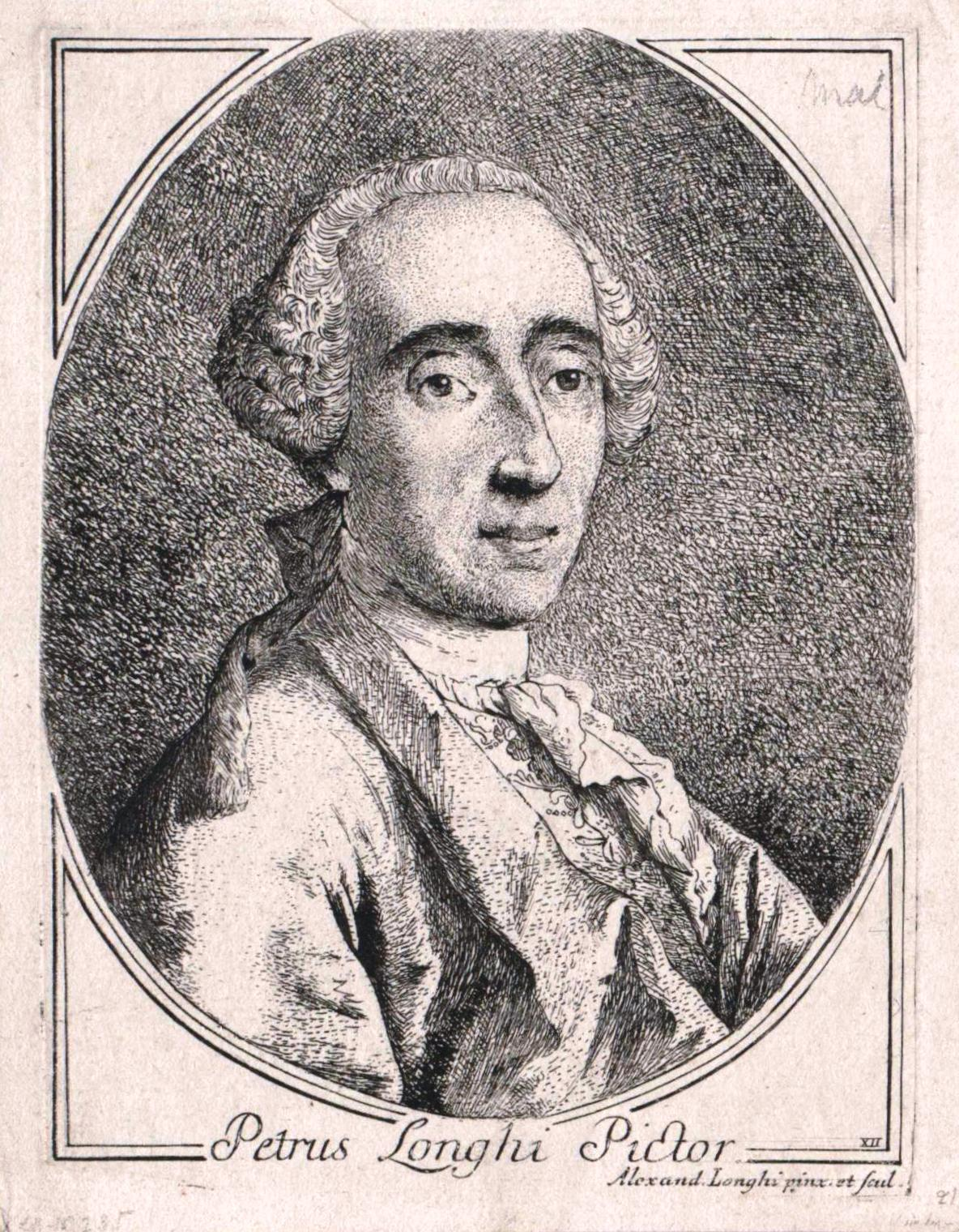 Petrus Longhi (1702–1785)